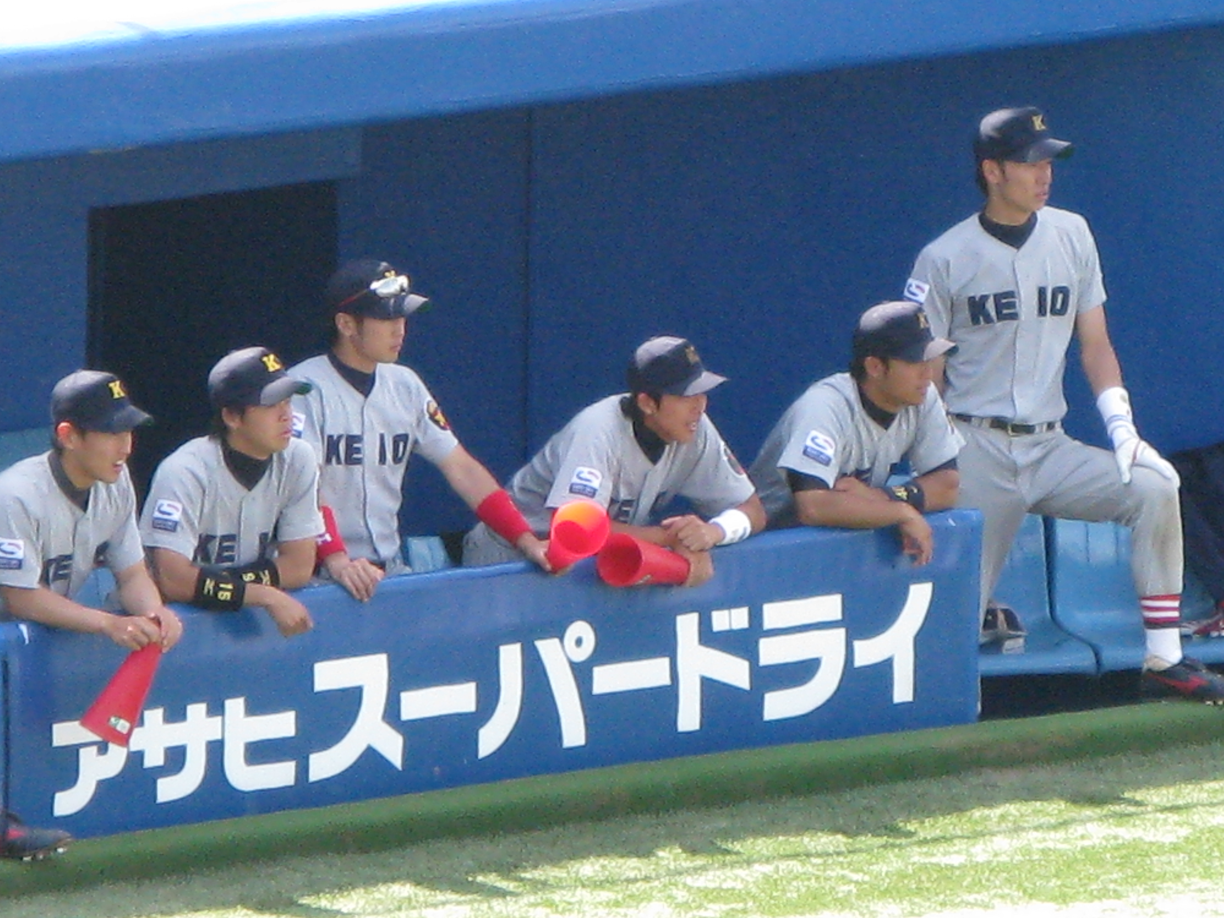 Wikipedia 10 Rennes